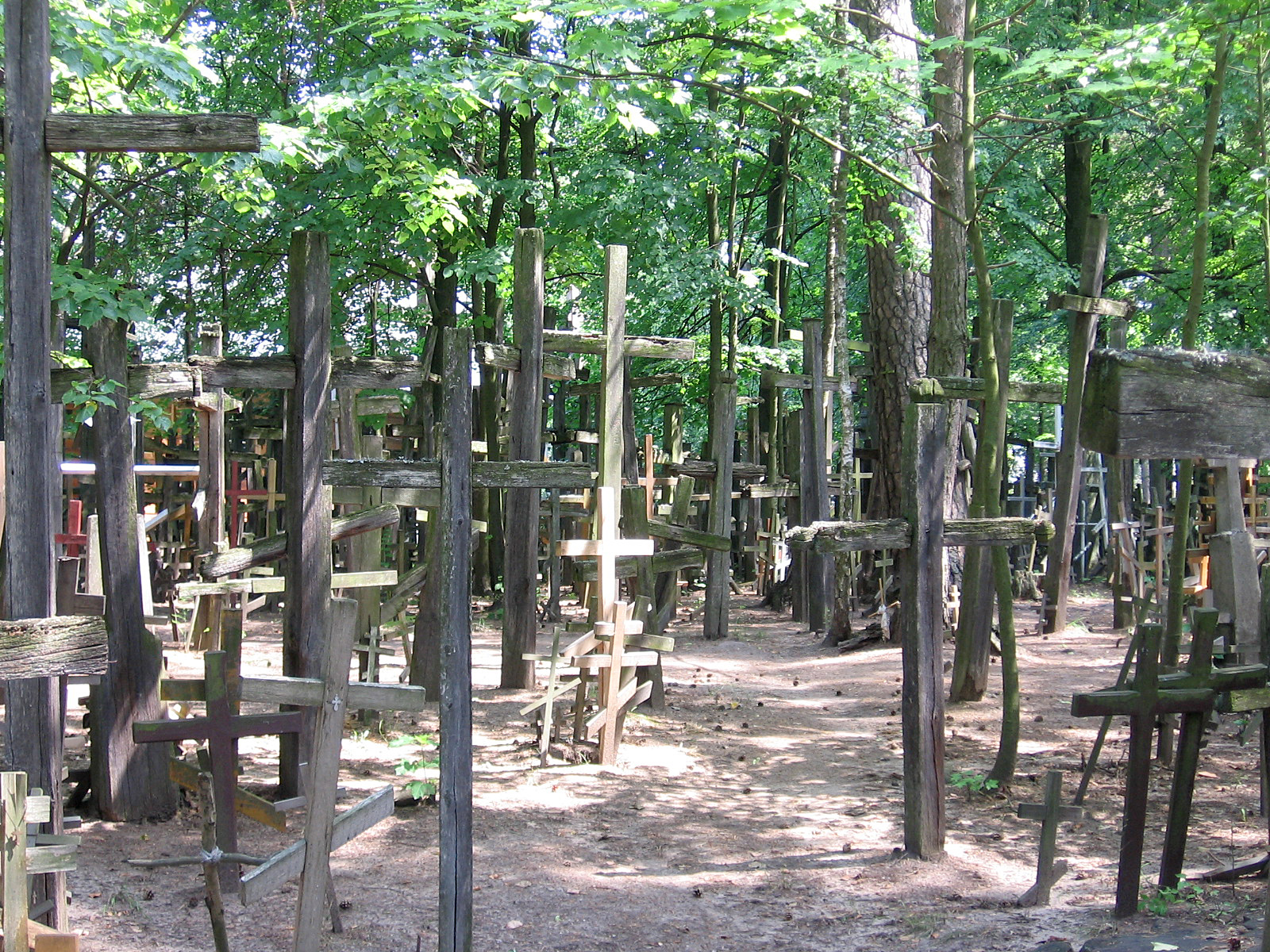 Święta Góra Grabarka